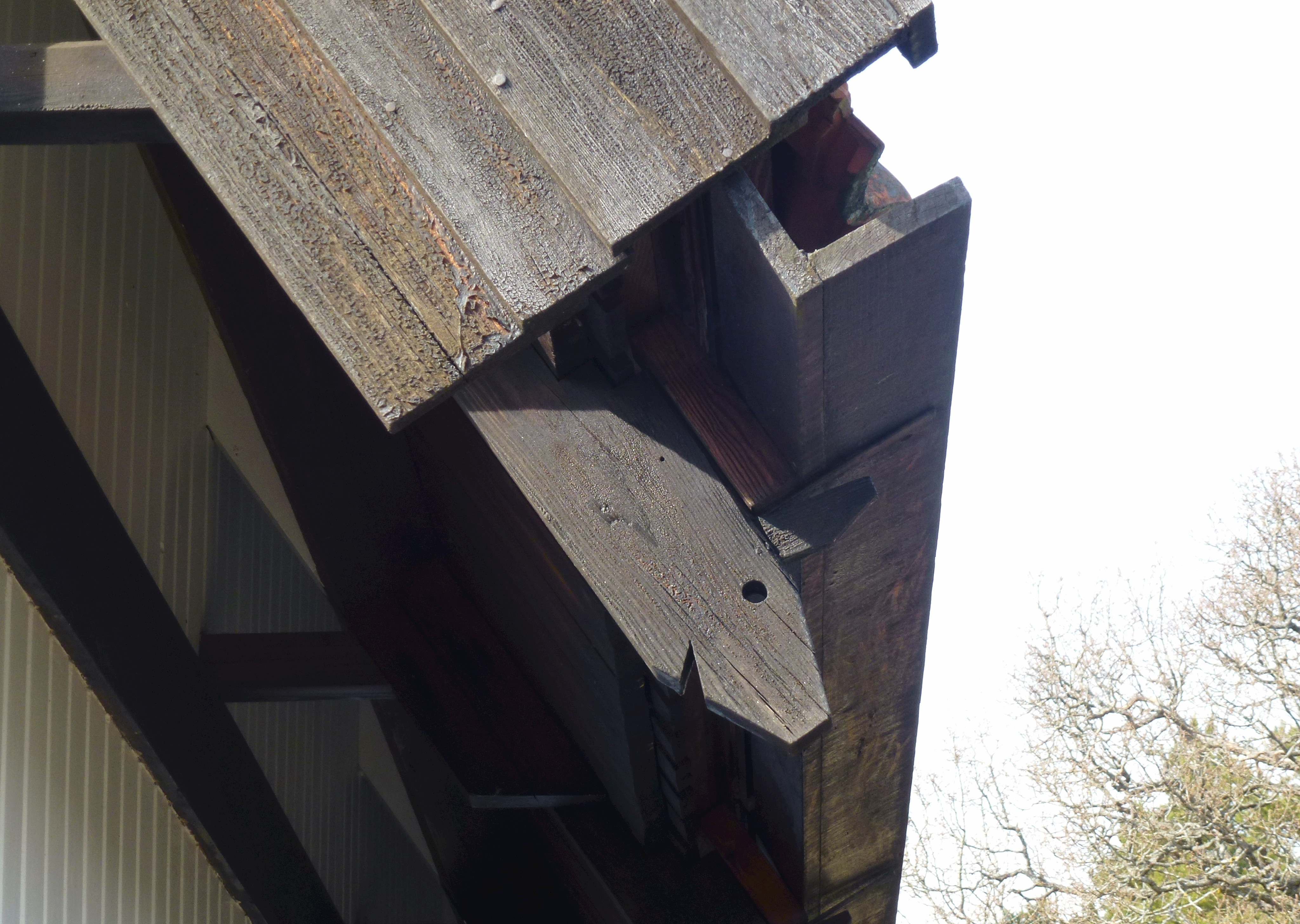 Villa Torsvi, konstnären J.A.G. Ackes sommarvilla på östra Torö i Nynäshamns kommun.